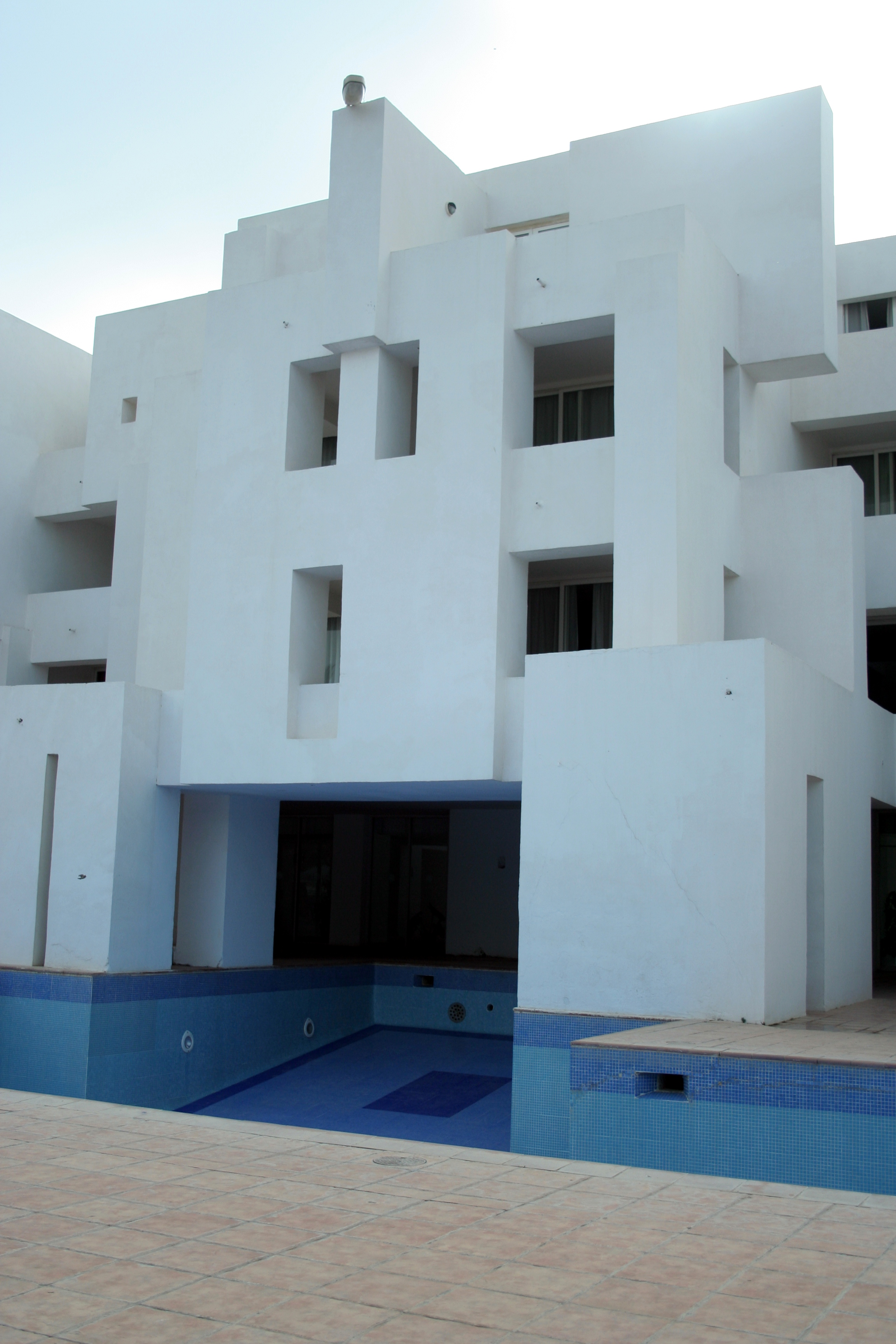 L'hôtel El Marsa à Sidi-Ferruch (Sidi-Fredj), Algérie, par l'architecte Fernand Pouillon.